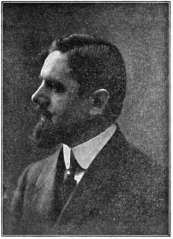 Arh. Ştefan Burcuş - arhitectul şef al Expoziţiei din 1906, România, 1910